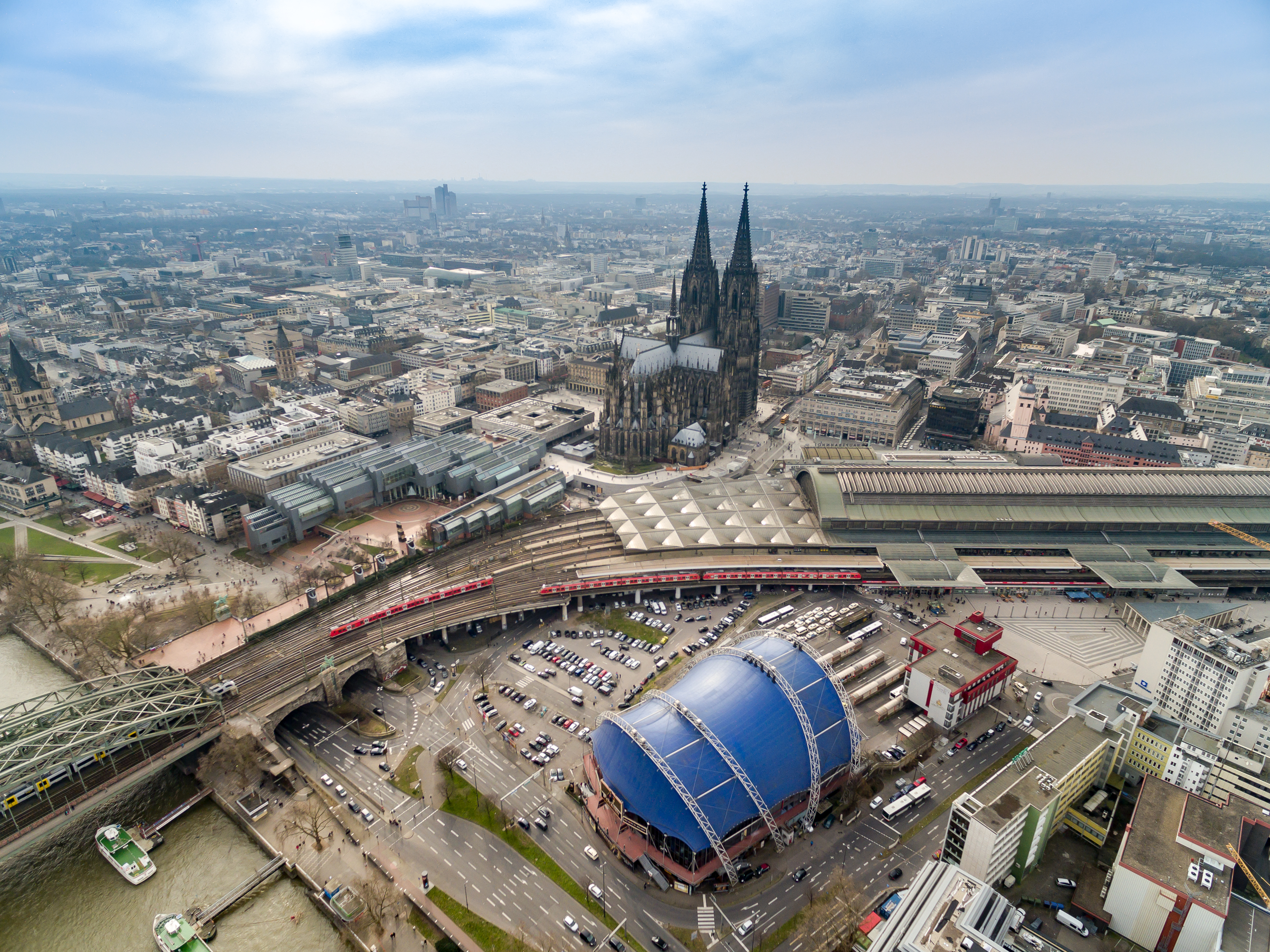 Der Kölner Dom ist mit 157,38 Metern Höhe nach dem Ulmer Münster das zweithöchste Kirchengebäude Europas sowie das dritthöchste der Welt.